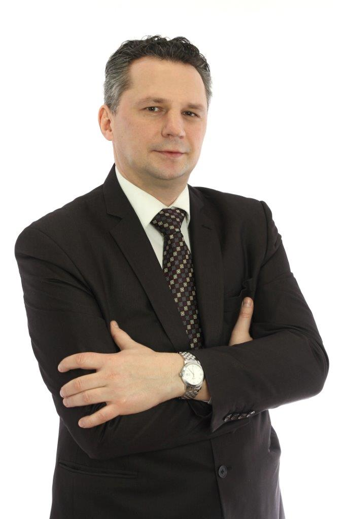 Ramojus Kraujelis